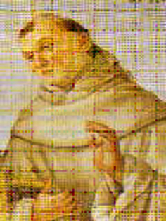 Frate Masseo da Marignano OFM